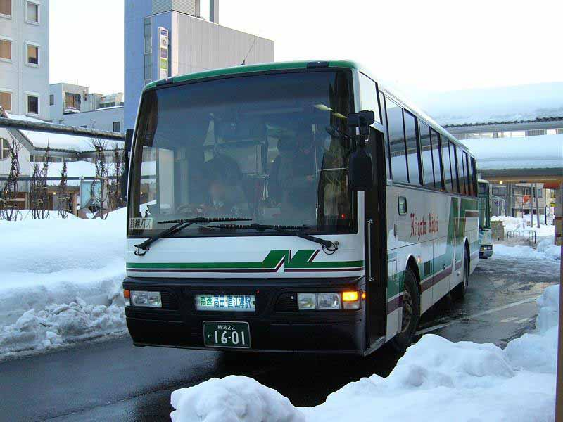 新潟22か16-01。新潟交通所属県内高速用車両（各系統で共通運用）。高田駅前にて撮影。